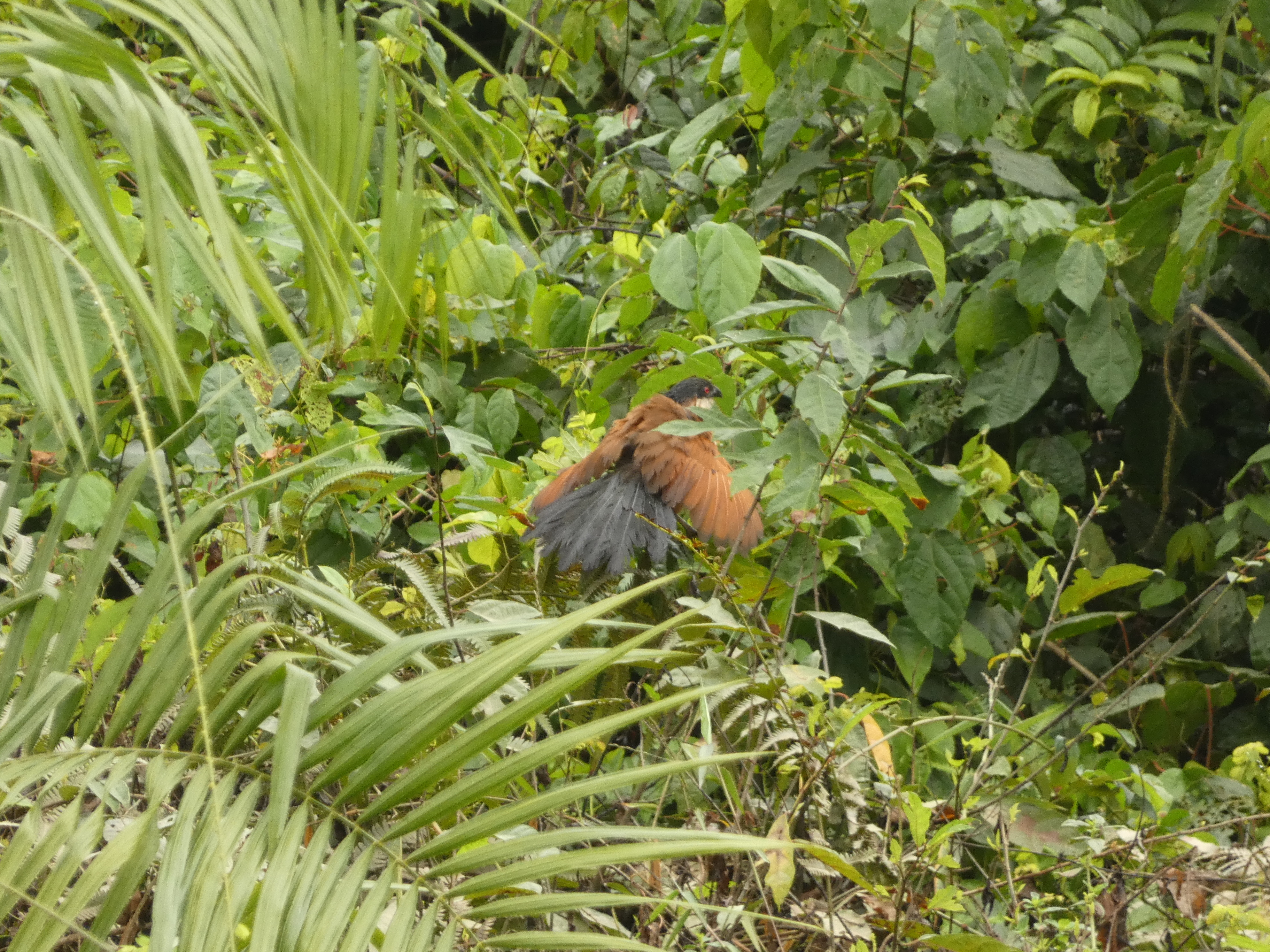 Centropus senegalensis im Nationalpark Tai